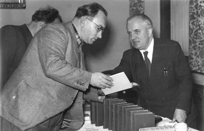 Illus-Rudolph 5.1.51 1. Buchserie fortschrittlicher Schriftsteller erscheint. Die ersten zehn Bände der Bibliothek fortschrittlicher Schriftsteller, die nach der Kulturverordnung der DDR vom 16.3.50 herausgegeben wird, erscheinen jetzt. Aus diesem Anlass fand am 5.1.51 im Kulturbundhaus in Berlin eine Pressekonferenz statt. UBz: Schriftsteller Petersen diskutiert mit Willi Bredel über die Buchserie.